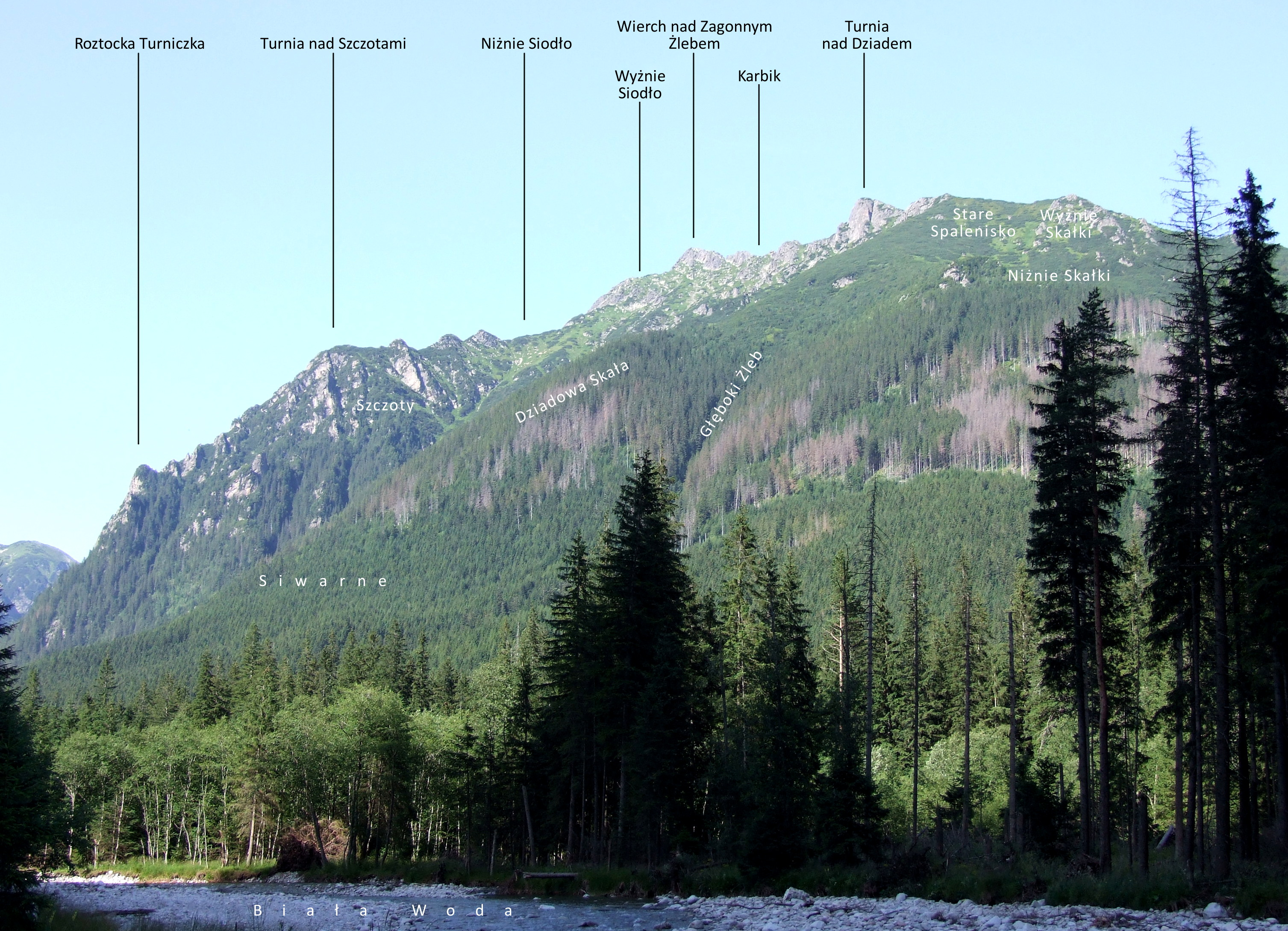 Masyw Wołoszyna od wschodniej strony, widok z Doliny Białej Wody